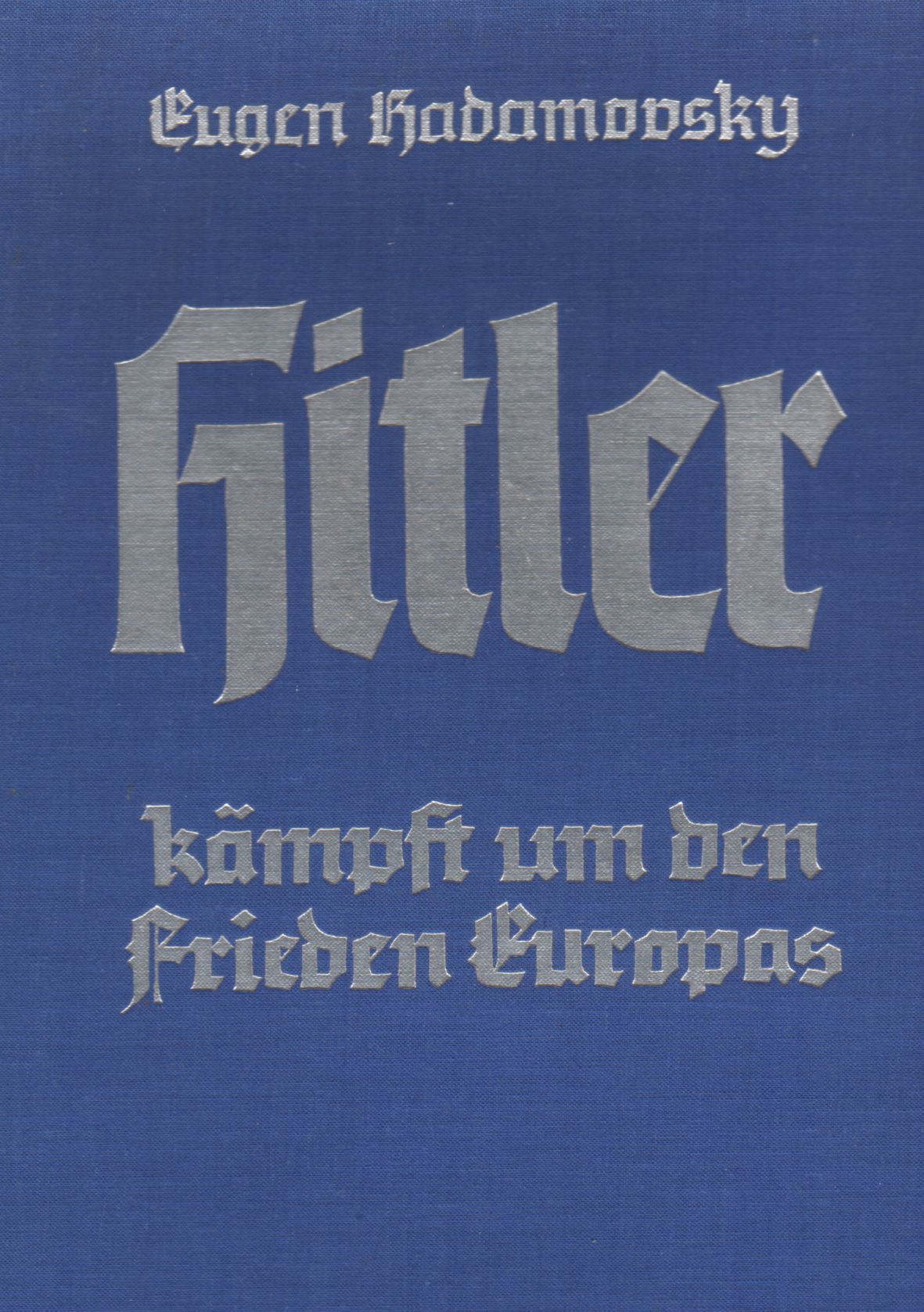 Buchtitel 1937